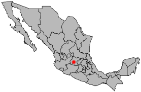 Locator map of Irapuato, Guanajuato, Mexico